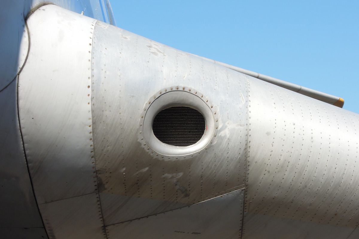 Вторичный воздухо-воздушный радиатор (ВВР) системы кондиционирования в крыле самолёта Ту-154Б